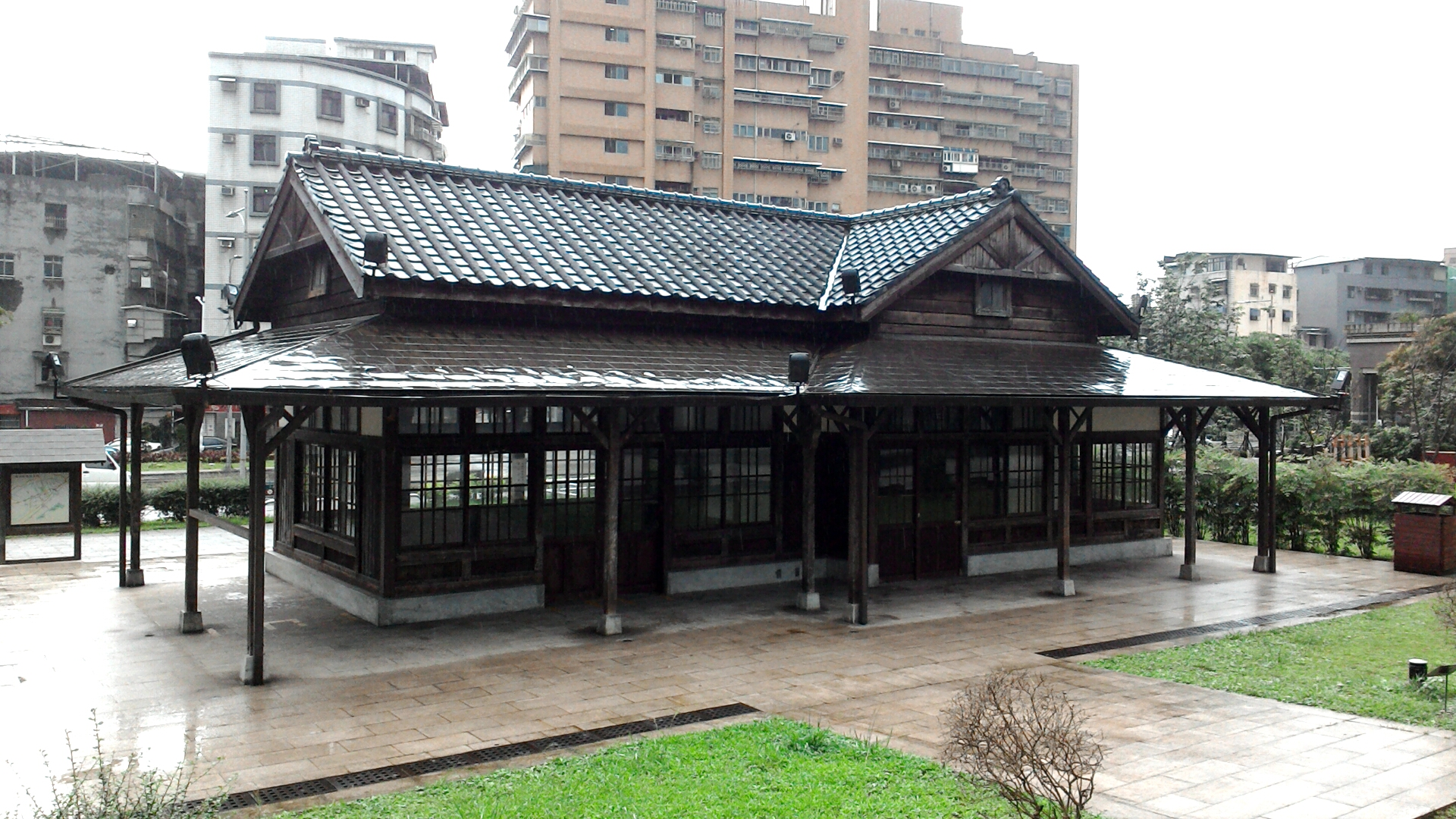 台鐵七堵前站舊站房背面,基隆市七堵區長興里